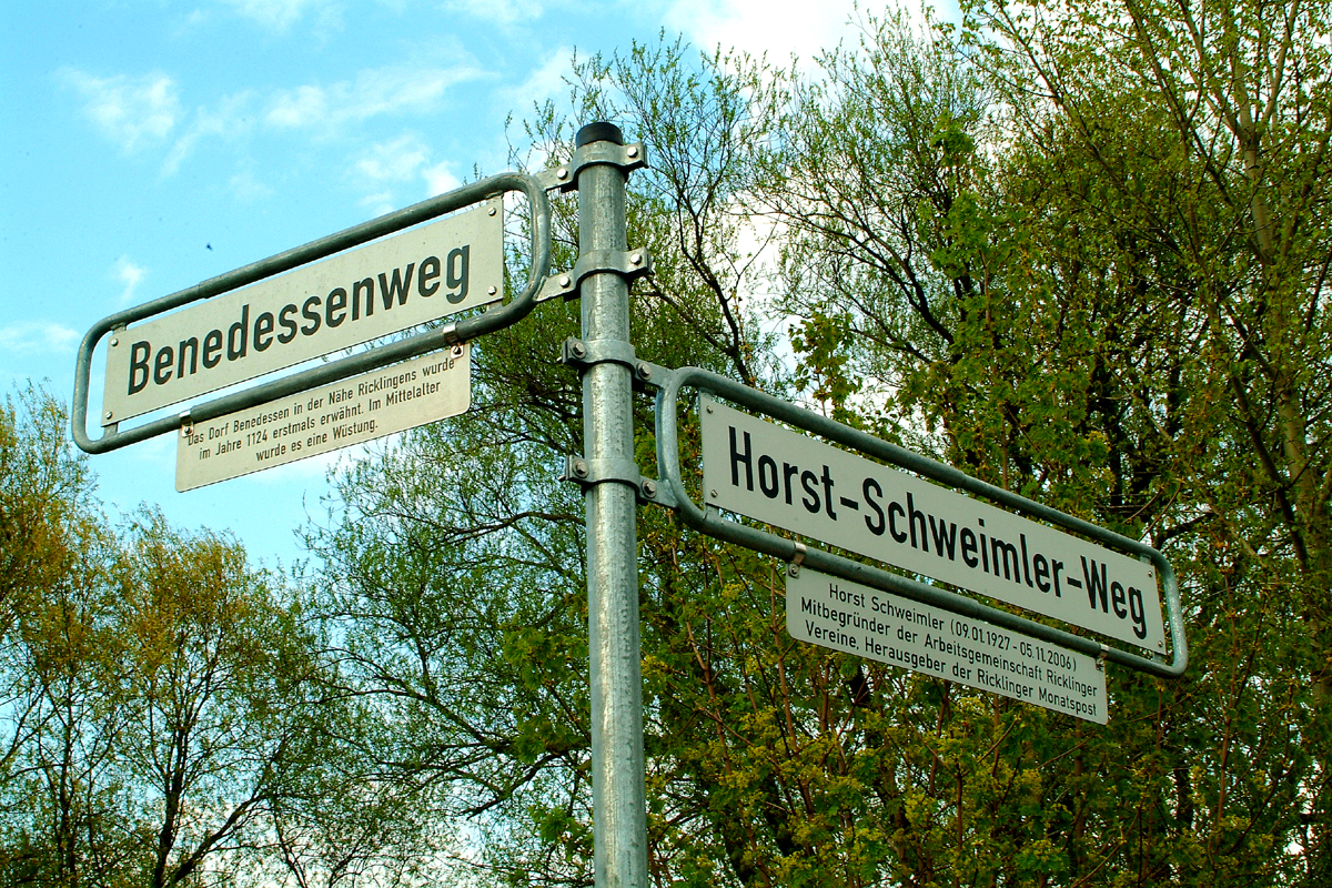 Sie haben ein besseres Bild? Sogar ein historisches Dokument als Bild(ungsförderung)? Zeigen Sie' s uns. Stiften Sie es, allen Menschen.